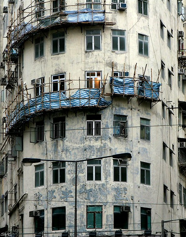 Gerüst in Hong Kong.